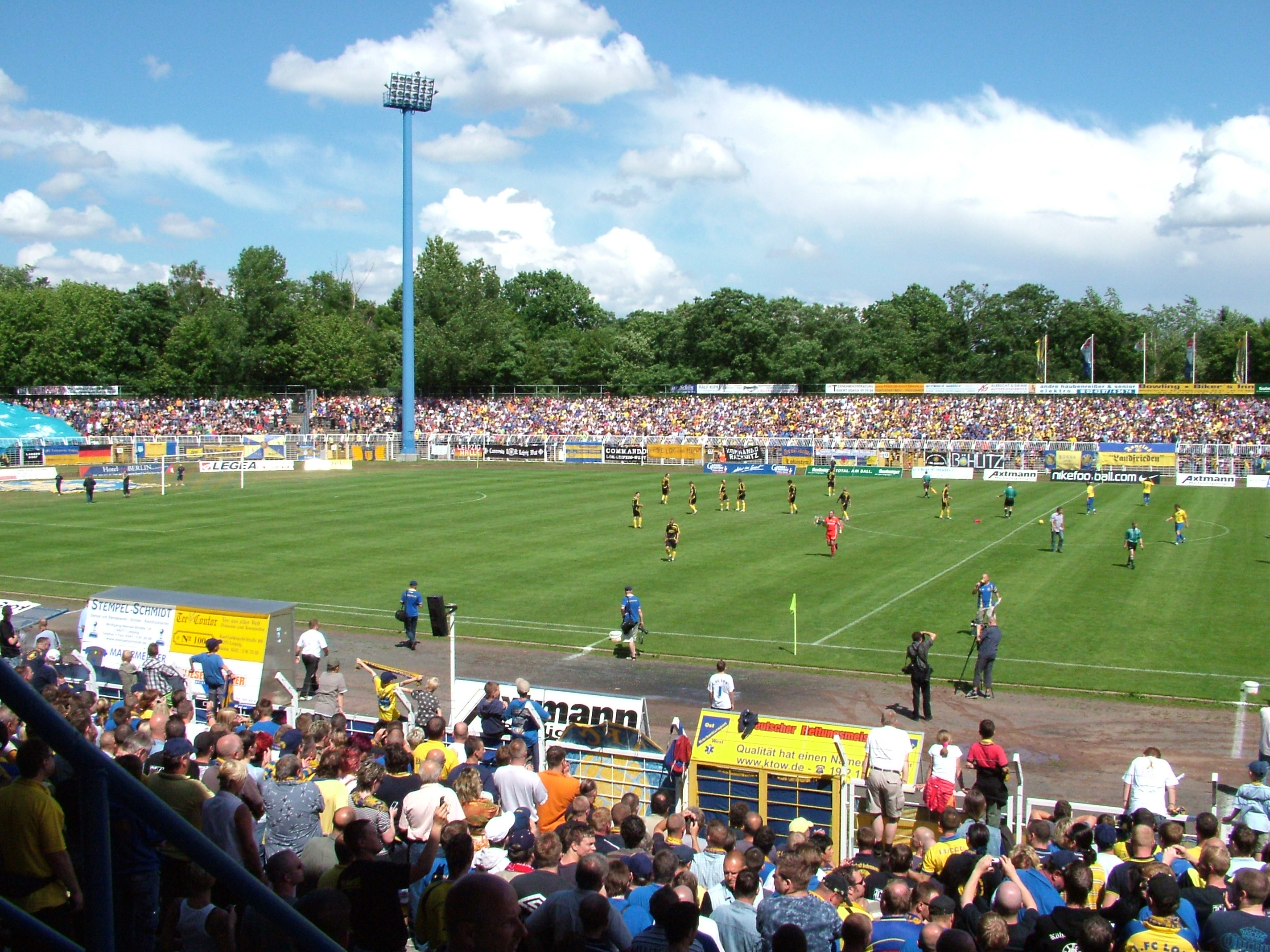 Bruno-Plache Stadion am Spieltag